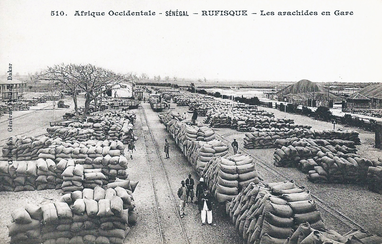 François-Edmond Fortier, Rufisque. Les arachides en gare. Afrique Occidentale - Sénégal.